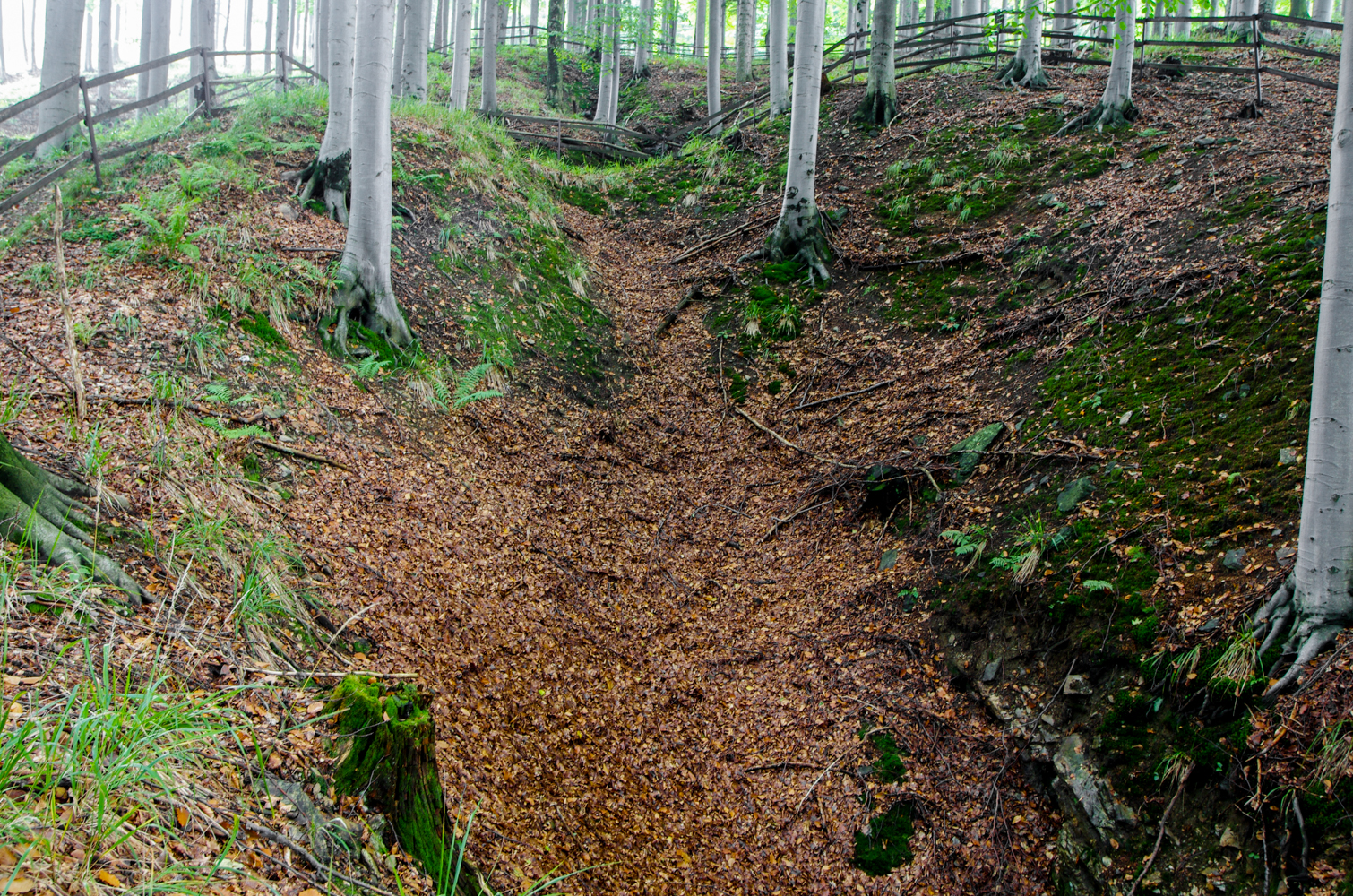 Přírodní památka Štola Marie Pomocná, Zlaté Hory, okres Jeseník